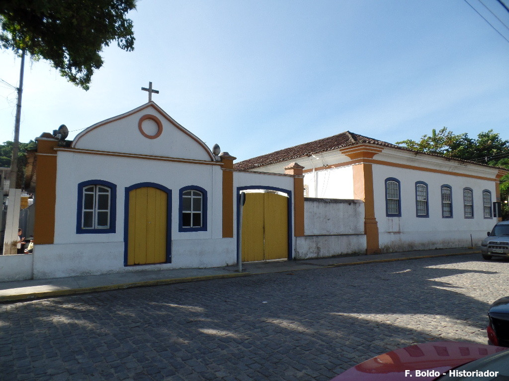 Com o nome original de Hospital Pedro de Alcântara fundado no ano de 1822